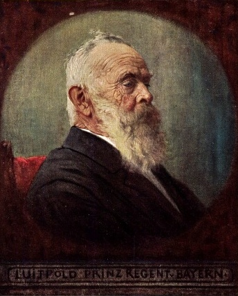 Prinzregent Luitpold von Bayern, gemalt von Walter Firle (1859-1929)